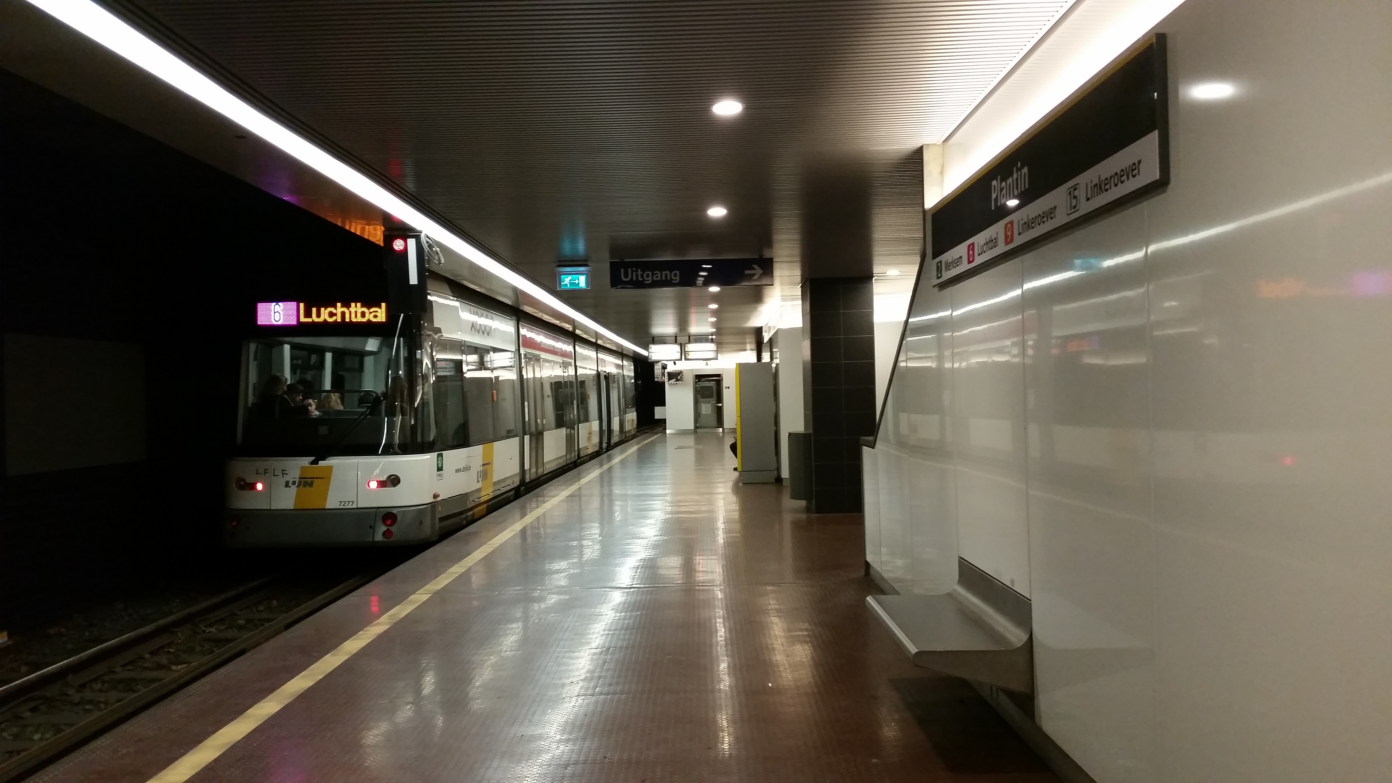 Tramvai al liniei 6 la nivelul -2 al stației de premetrou Plantin din Antwerpen.